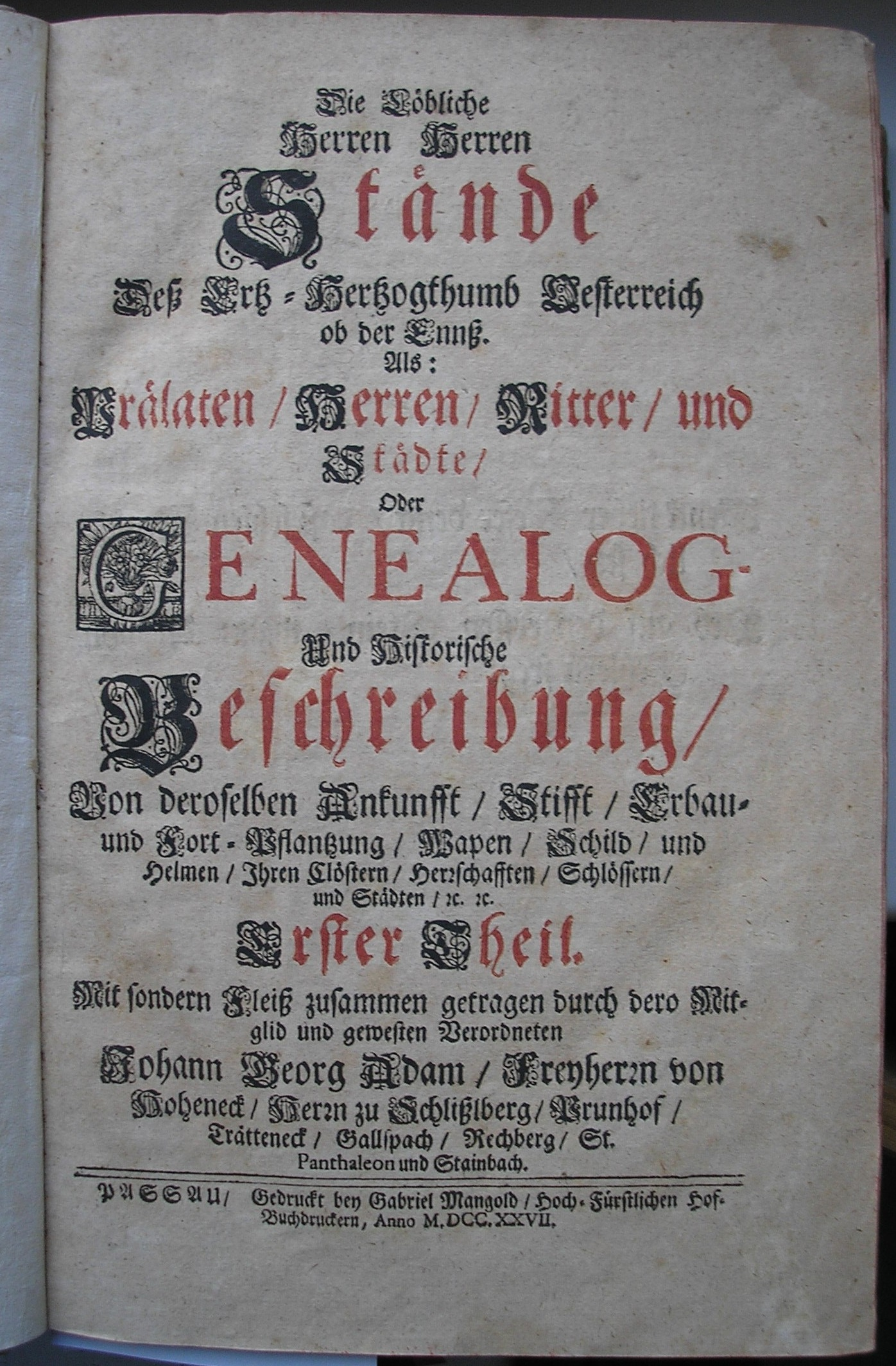 Titelblatt des 1. Bandes (1727) von Johann Georg Adam von Hoheneck (1669-1754) verfassten dreibändigen Werkes Die löblichen Herren, Herrenständ deß Ertz-Hertzogthumbs Oesterreich ob der Ennß.